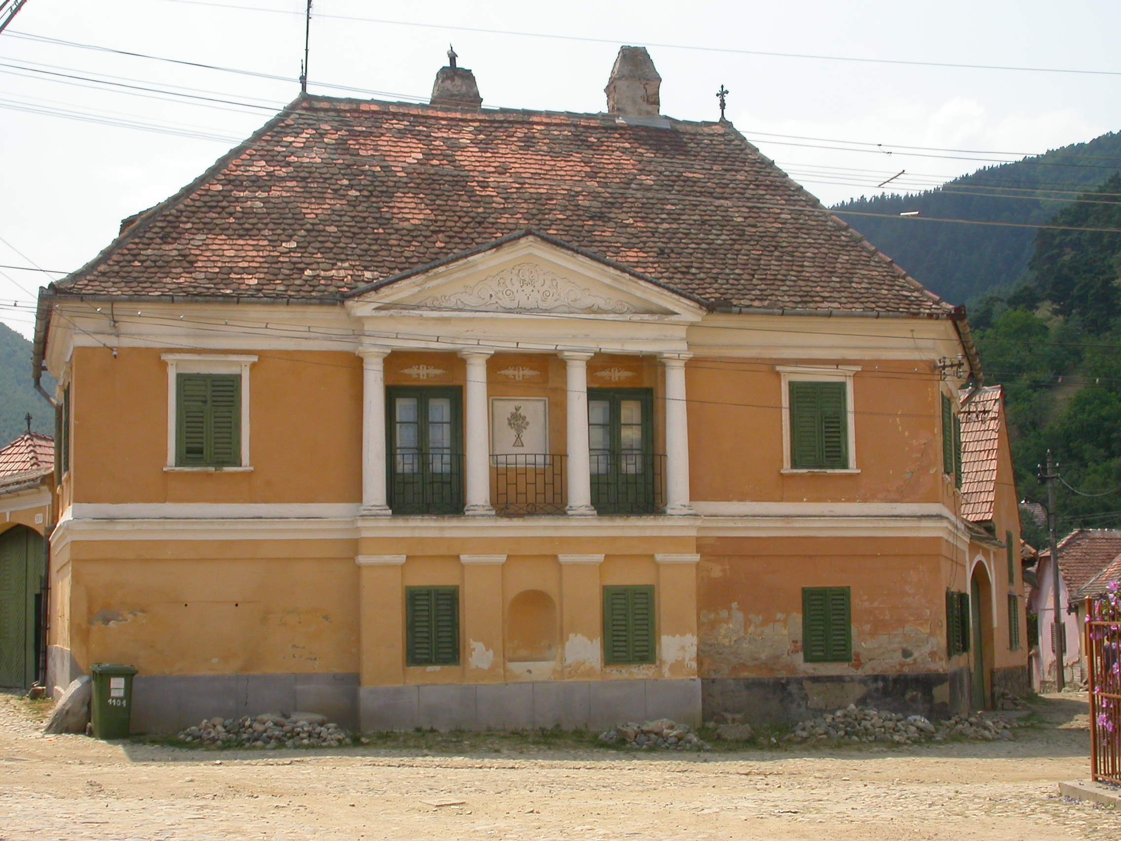 Casa Episcopilor - Parohia Ortodoxă Rășinari, sec. XVIII